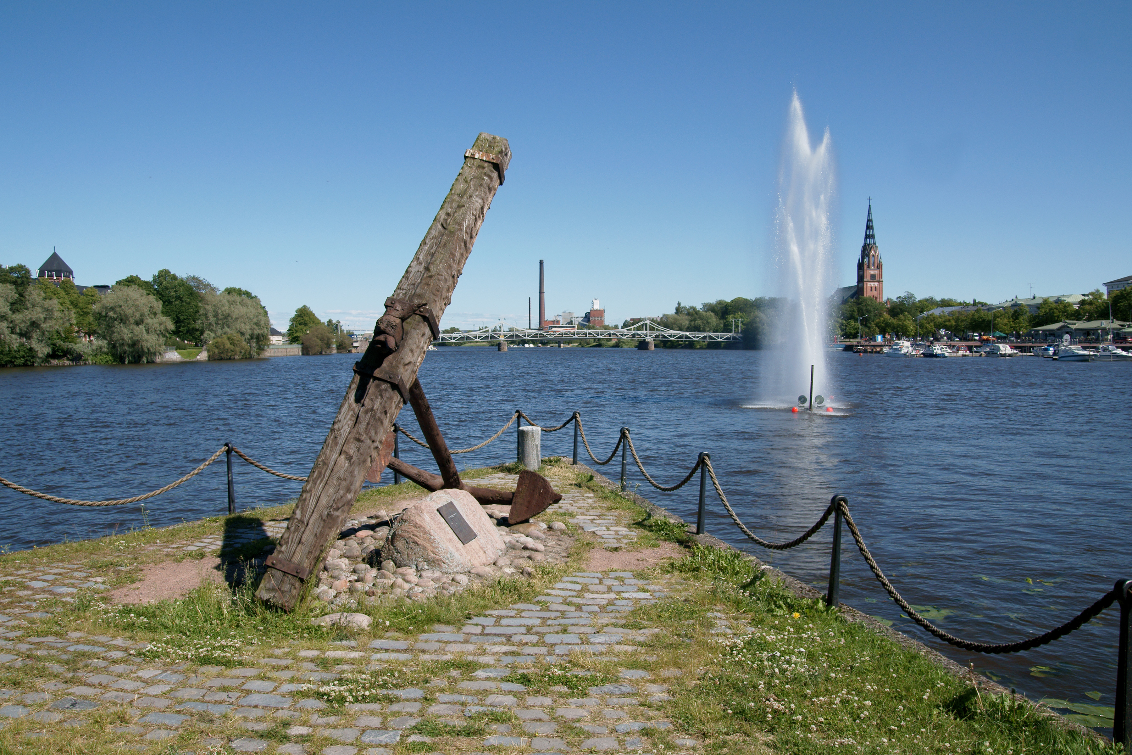 Ankkuri Kirjurinluodon kärjessä, porilaisen merenkulun ja satamien muistoksi.